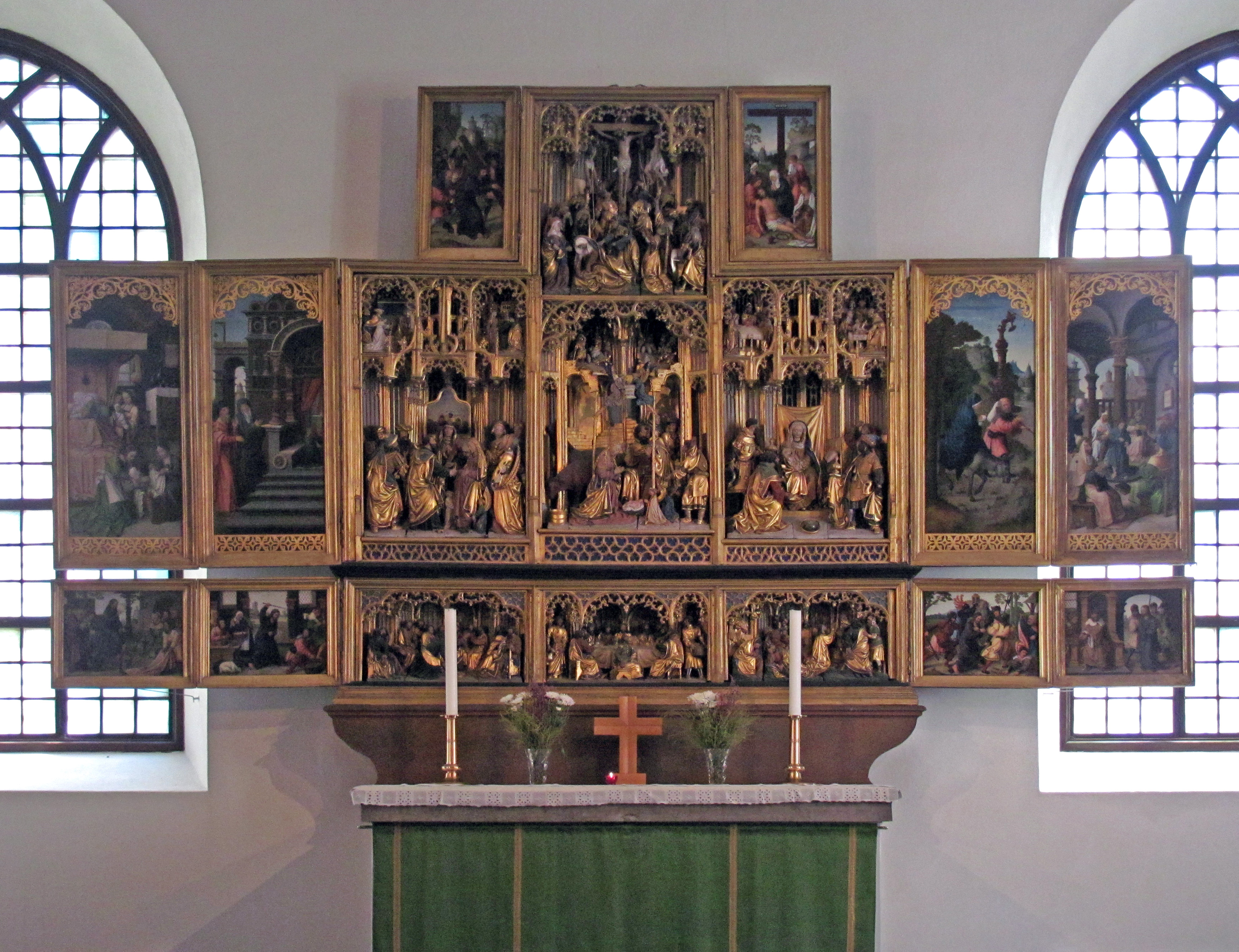 Jäders kyrka, altarskåp